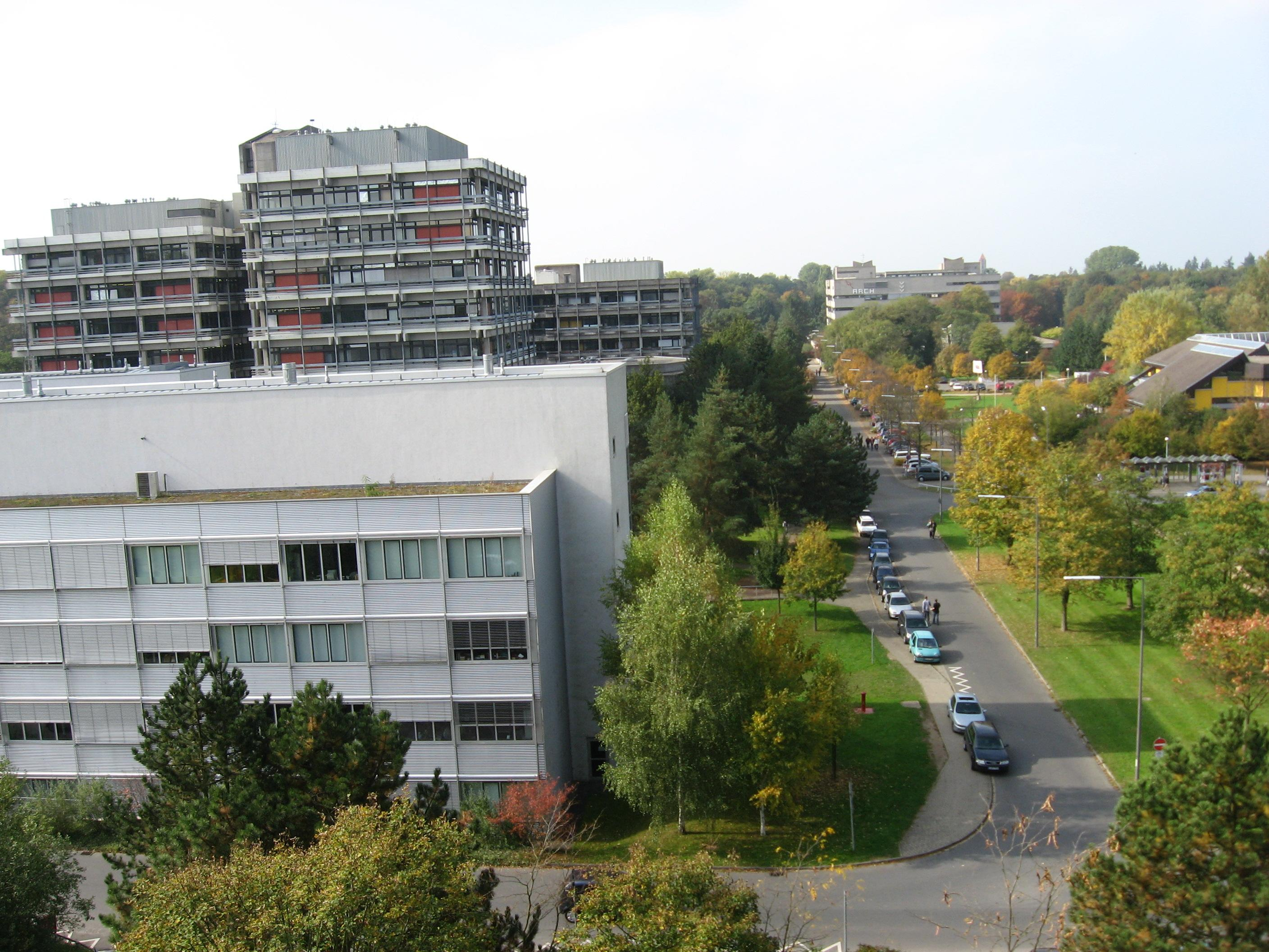 Überblick über den Süden des Campus Lichtwiese, TU Darmstadt. Am linken Bildrand vorne das Gebäude der Materialwissenschaft (L2 01), dahinter das Gebäude der Organische Chemie (L2 02), rechts davon ganz hinten das Architektur-Gebäude (L3 01) und schließlich am rechten Bildrand die Mensa Lichtwiese (L4 01). Fotographiert aus dem südlichen obersten Stock des Gebäudes des Maschinenbaus (L1 01)